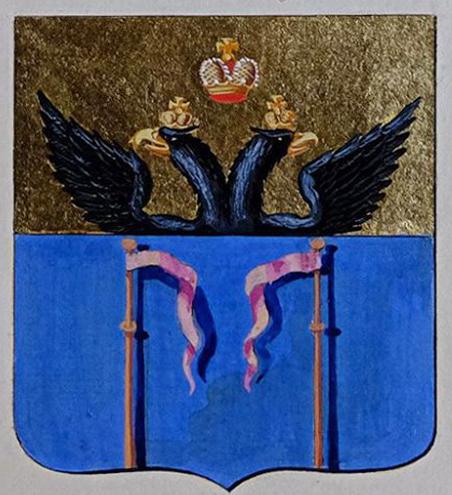 Беларуская (тарашкевіца): Бабінавічы (Babinavičy). Герб места